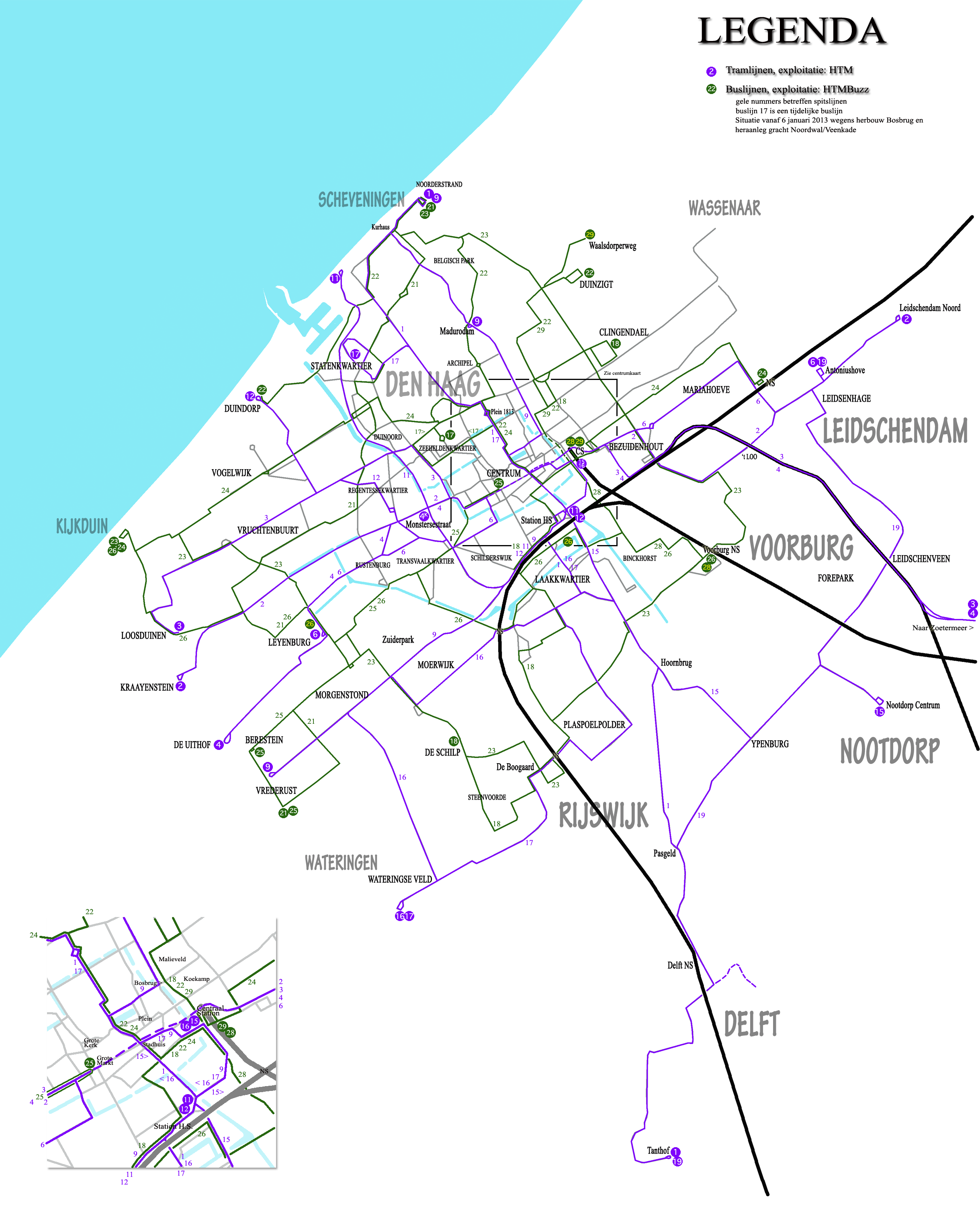 Carte du réseau de bus et de tramways de La Haye en 2013.